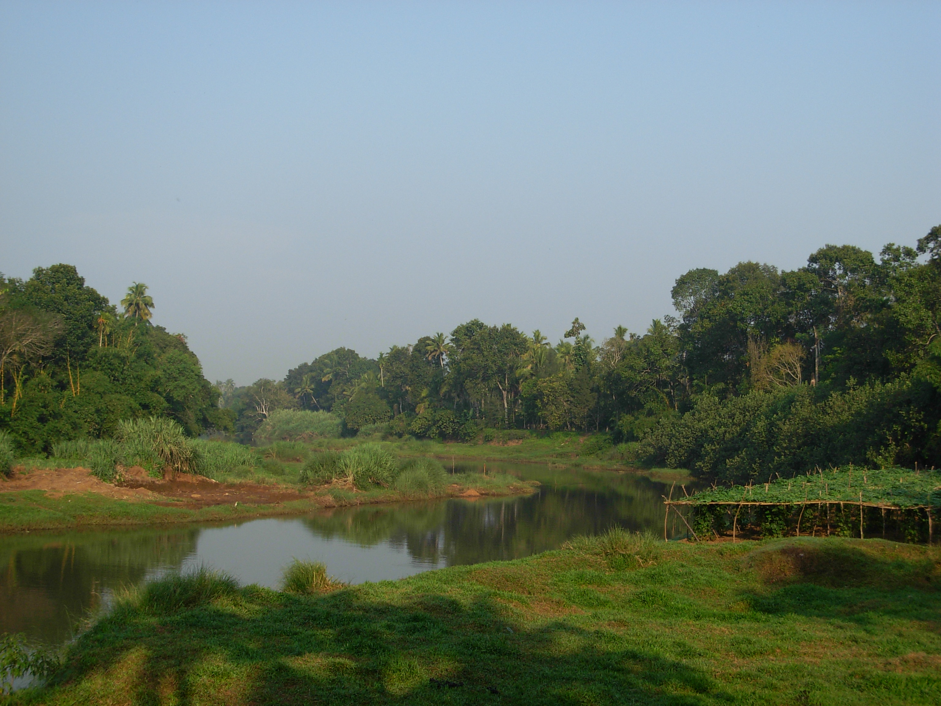 അച്ചൻകോവിലാർ. മണ്ണെടുപ്പും ആറ്റിലെ കൃഷിയും കാരണം മരിക്കുന്ന പുഴ. കൃഷിചെയ്യുന്നതിന് ആറ്റിലെ മണ്ണെടുത്ത് സ്ഥലമുയർത്തി ആറിനെ ഞെരുക്കിയിരിക്കുന്നു.